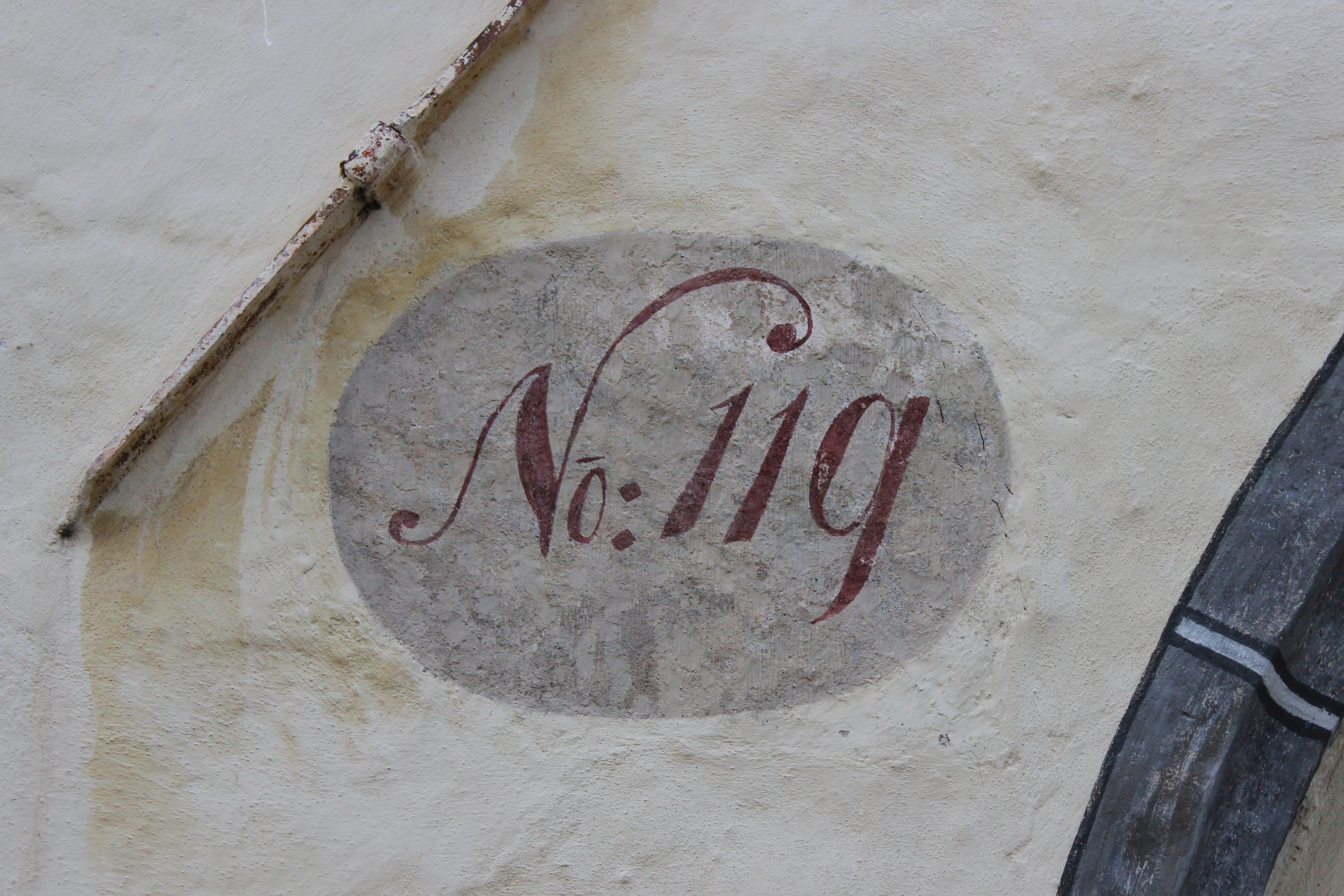 Prachatice